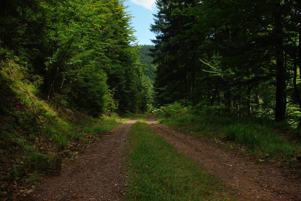 Photos prises entre Lutzelhouse, Urmatt et Oberhaslach.